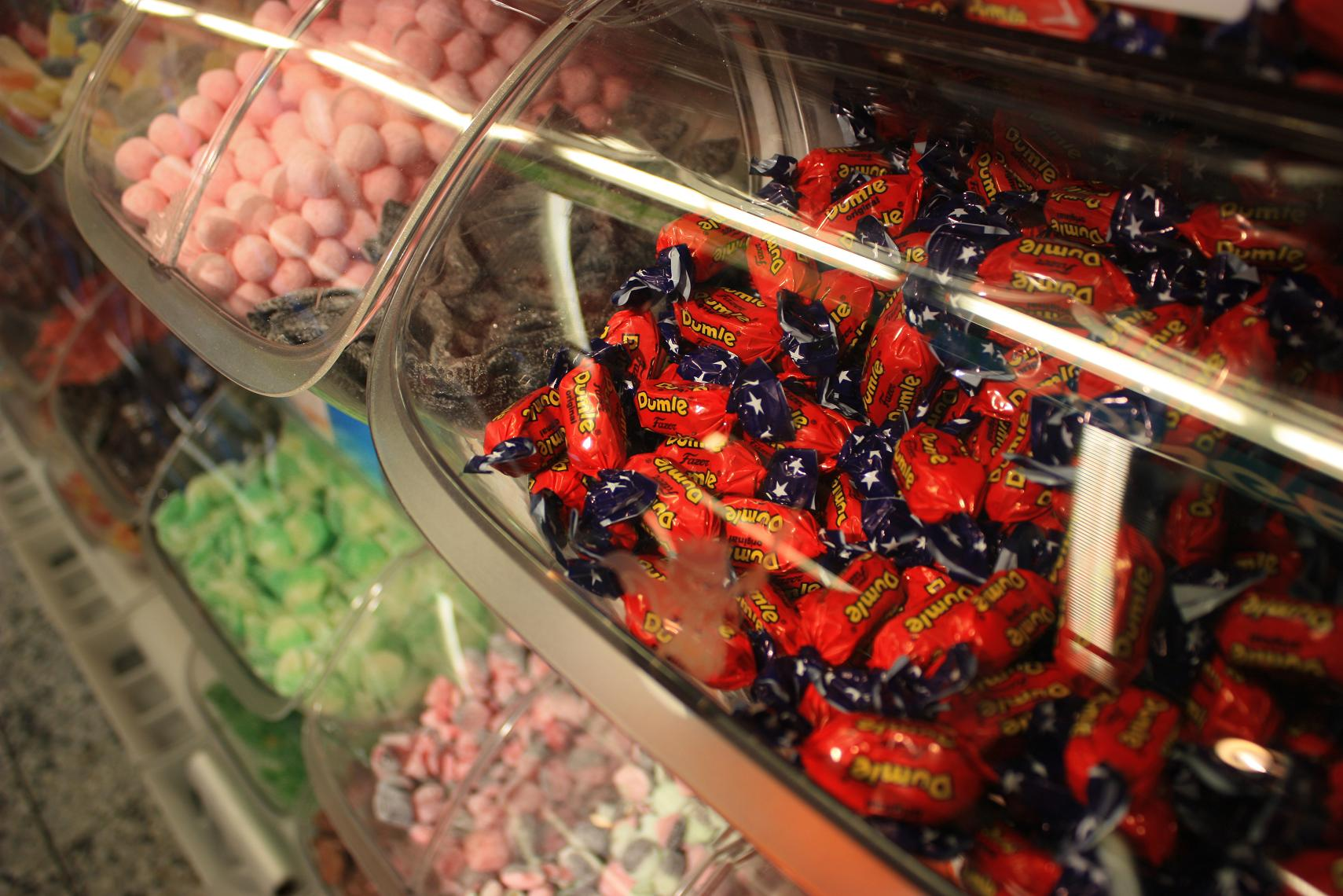 Słodycze